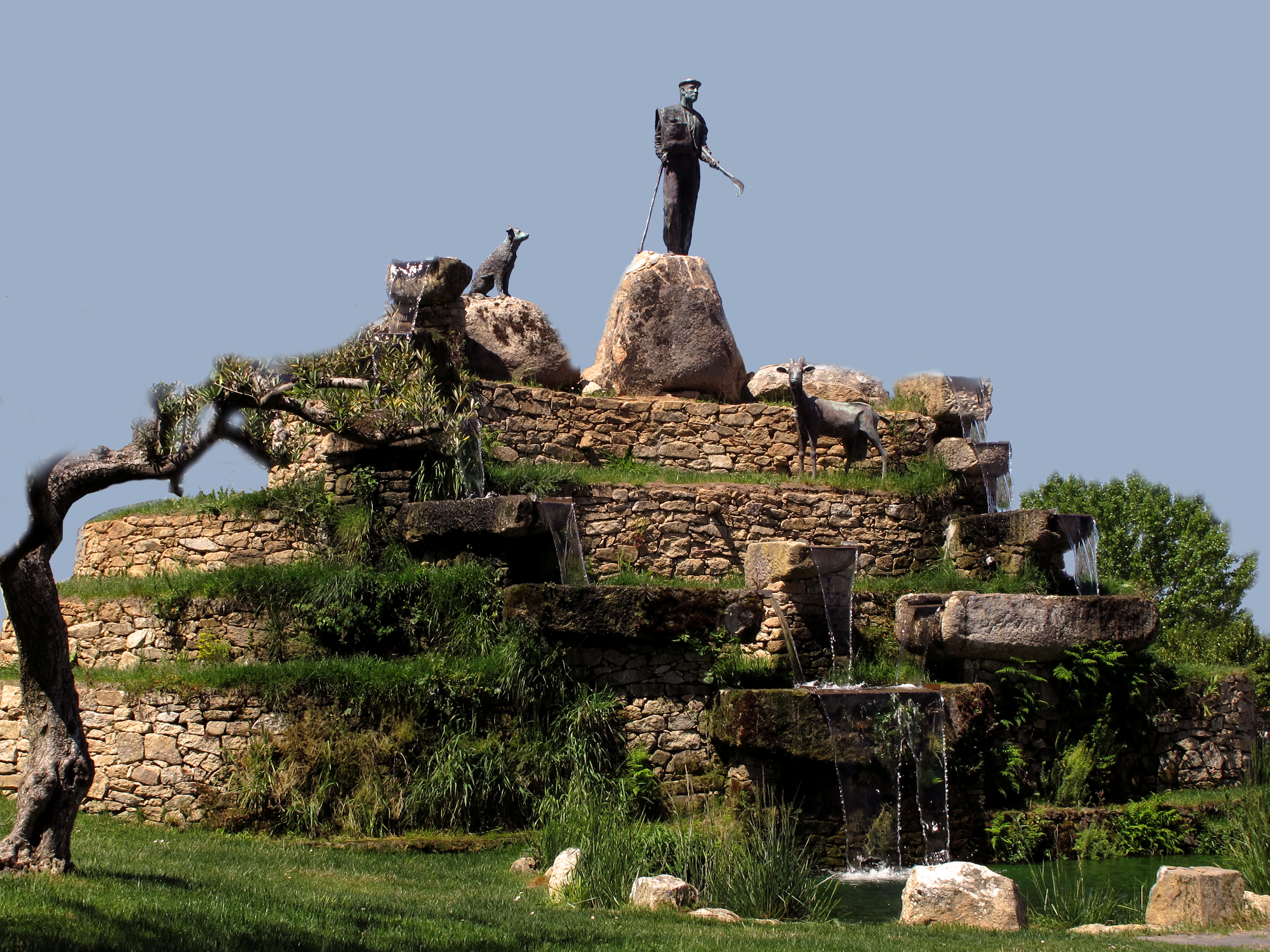 Una fuente con una estatua dedicada a los Cabreros de las Arribes, como "El Dientes" ese cabrero recordado en el pueblo, que en el último cuarto del siglo XIX se dedicaba a observar las aves, sus nidos y hacía equilibrios en lo más recóndito de Las Arribes, en el Picón de Felipe Los Arribes son ricas en vegetación, algo muy apreciado por el ganado caprino. El pastor pasa pues muchas horas en el campo para que las cabras se alimenten y ha construido corrales en los que proteger el ganado durante el día y si fuera preciso también durante la noche. «La gente no sabe que para tener ganado hay que disponer de conocimiento como si tuvieras una carrera» «con ver caminar una cabra reconozco si está mala» Va dando nombre a cada una de las parcelas que tiene enfrente, todas tienen su dueño . Aunque para el forastero toda la ladera es una misma unidad, pero el cabrero distingue todos los mojones. La vida de estos pastores rayaba la miseria. Eran otros tiempos.... todo valía. «Nuestros padres se dedicaban a entrar a los nidos», rememora el cabrero «los chavales avisábamos a los mayores cuando observábamos que un águila real se acercabaa su nido con una presa, que podía ser una perdiz o un conejo» Había que tener paciencia y esperar a que el animal lo depositara y se marchase. «Entonces una persona ya adulta se ataba a una cuerda y descendía hasta el lecho, mientras otro sujetaba la maroma desde arriba. El que estaba colgado en el vacío, le robaban la caza a la rapaz» «para evitar que los pollos de águila se lo comieran antes, les colocaban en el pico unos palos, llamados betijos, impidiéndoselo»